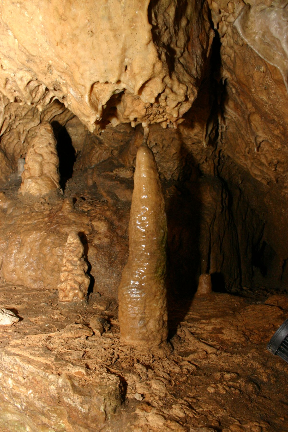 Binghöhle bei Streitberg